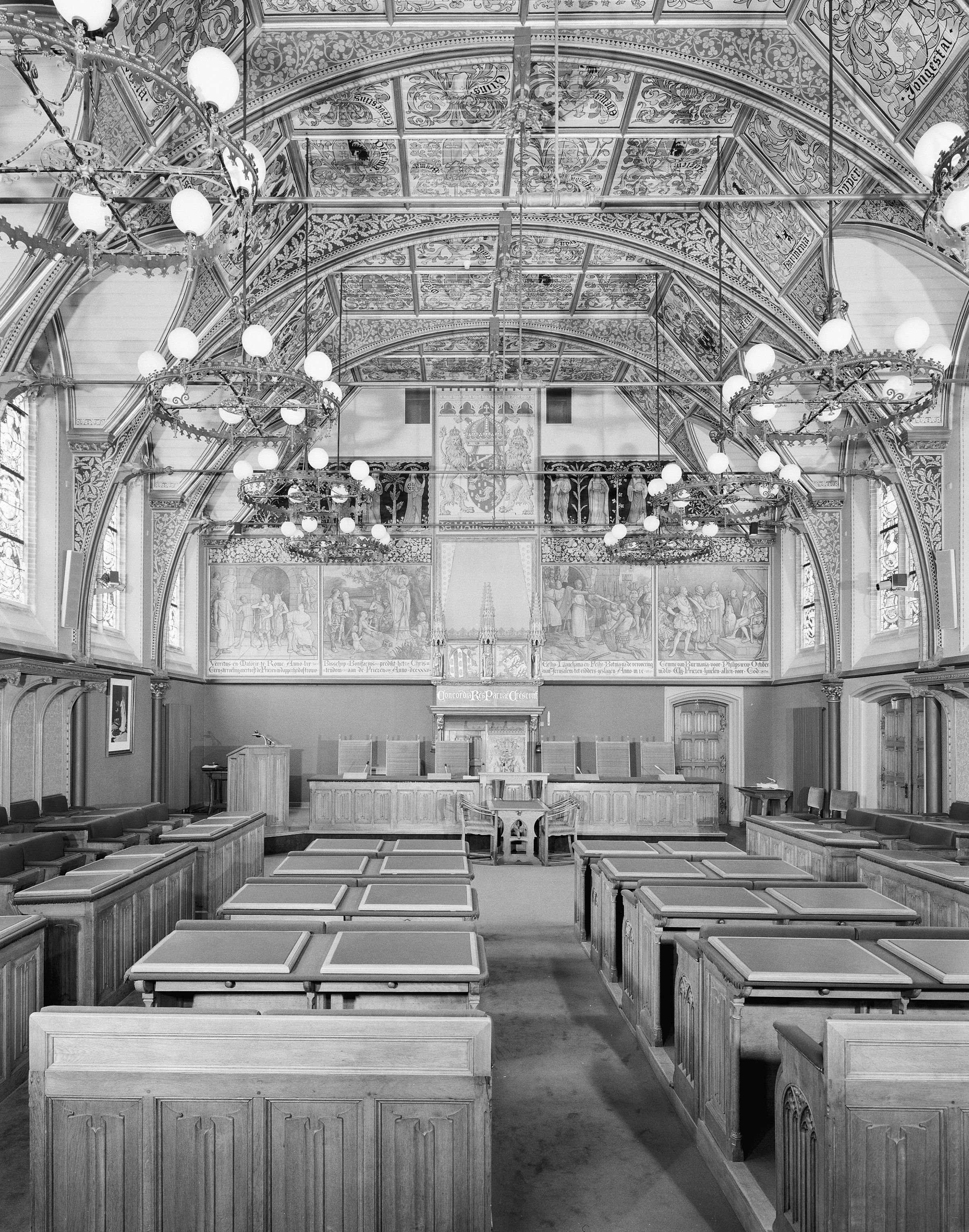 Provinciehuis: Interieur overzicht statenzaal met houten gewelf met Polonceauspanten en wapens van Friese grietmannen, schouw (opmerking: Monumenten In Nederland Friesland)